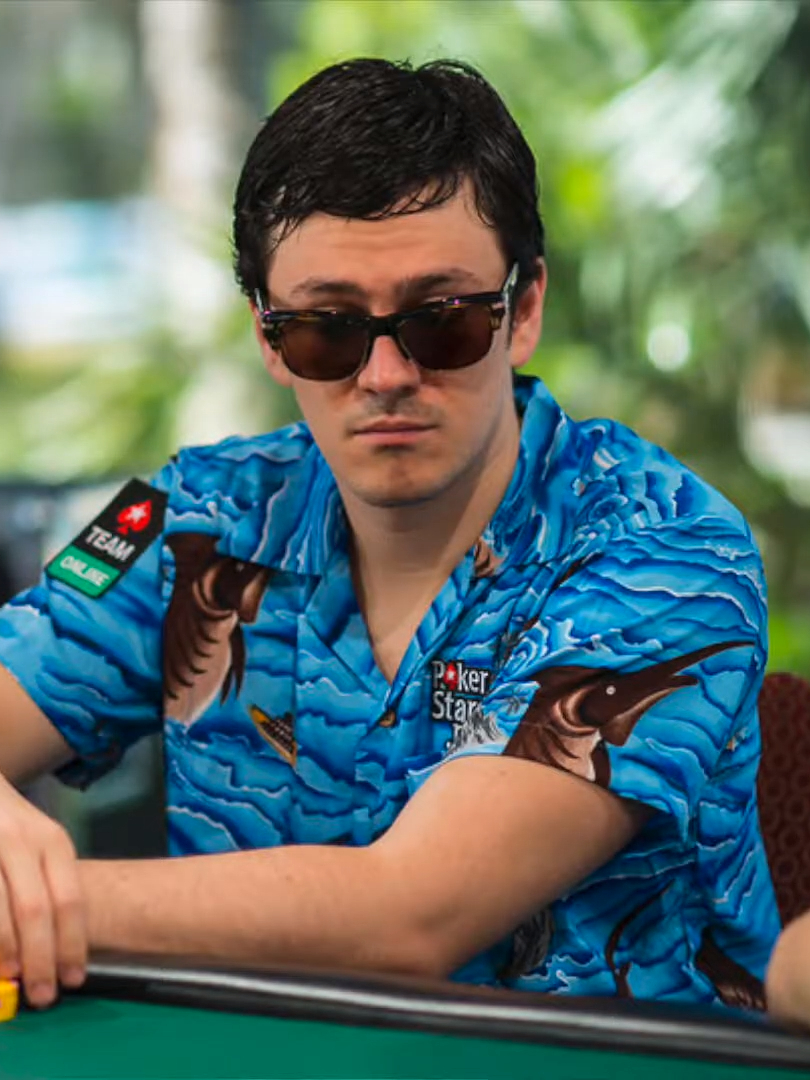 Isaac Haxton beim WPT Alpha8 St. Kitts